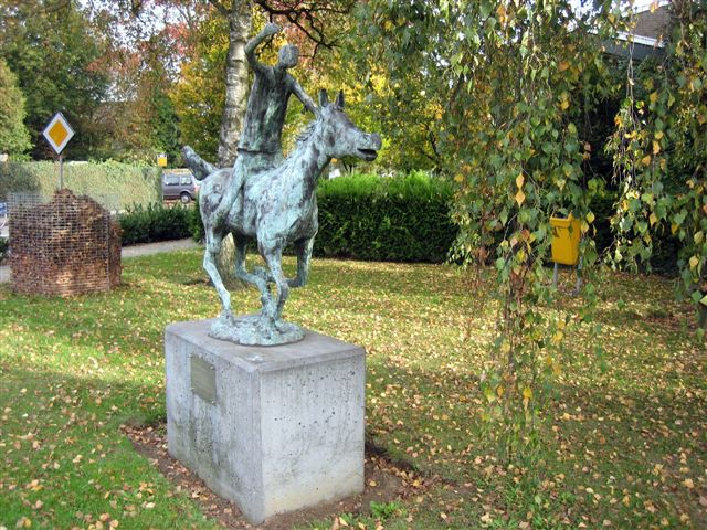 Het Metworstmunument op de hoek van de Sambeekseweg en de Bocstraat te Boxmeer. Dit beeld werd in 1999 opgedragen aan de Vereniging van tijdelijk jonggezellen "de Metworst".